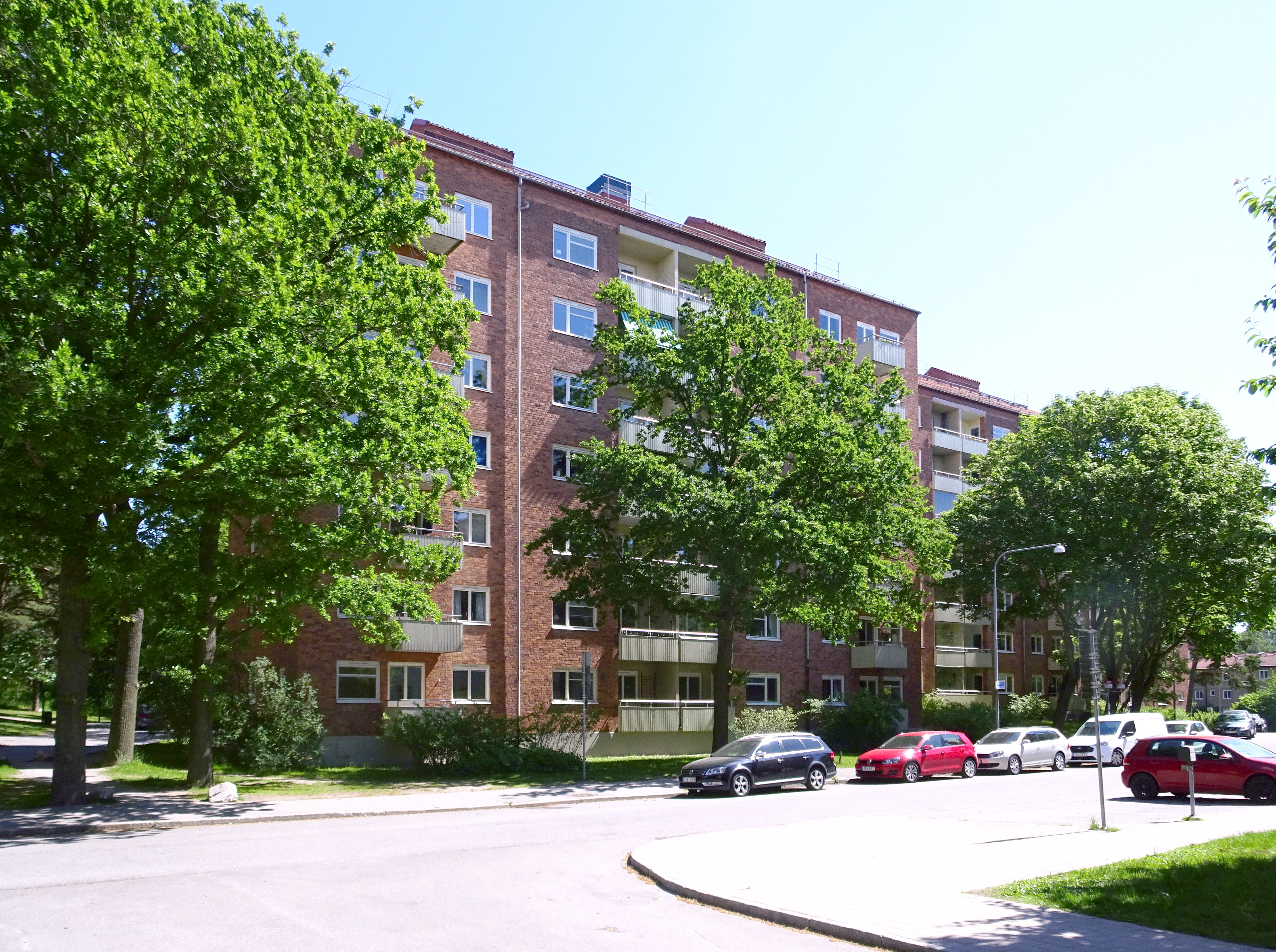 Bostadsområdet Näckrosen, Råsunda